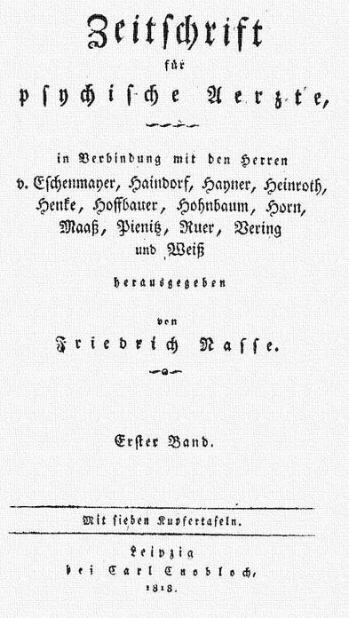 Zeitschrift für psychische Aerzte Band 1 Deckblatt